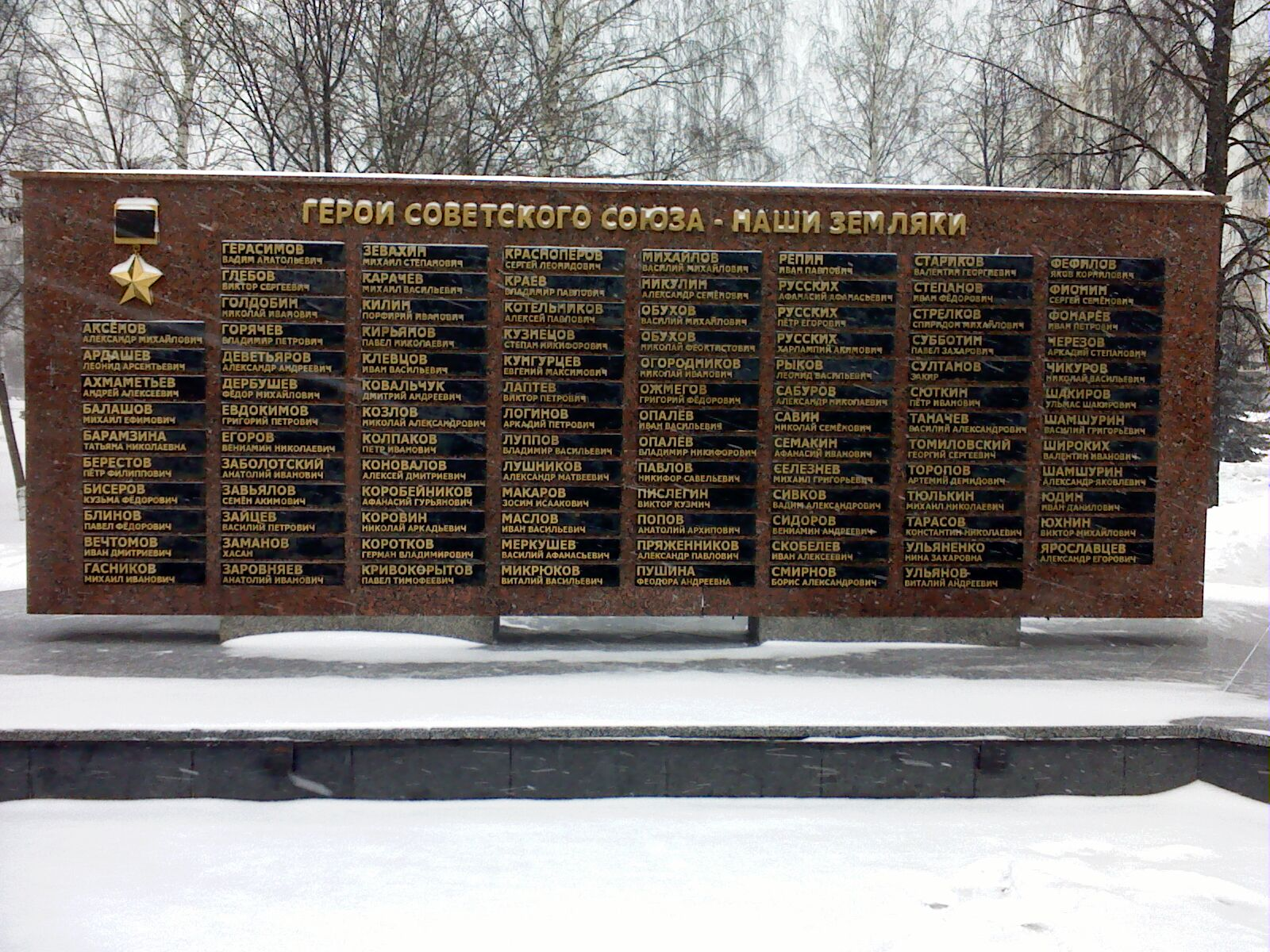 Мемориальная стела у Вечного огня в городе Ижевске